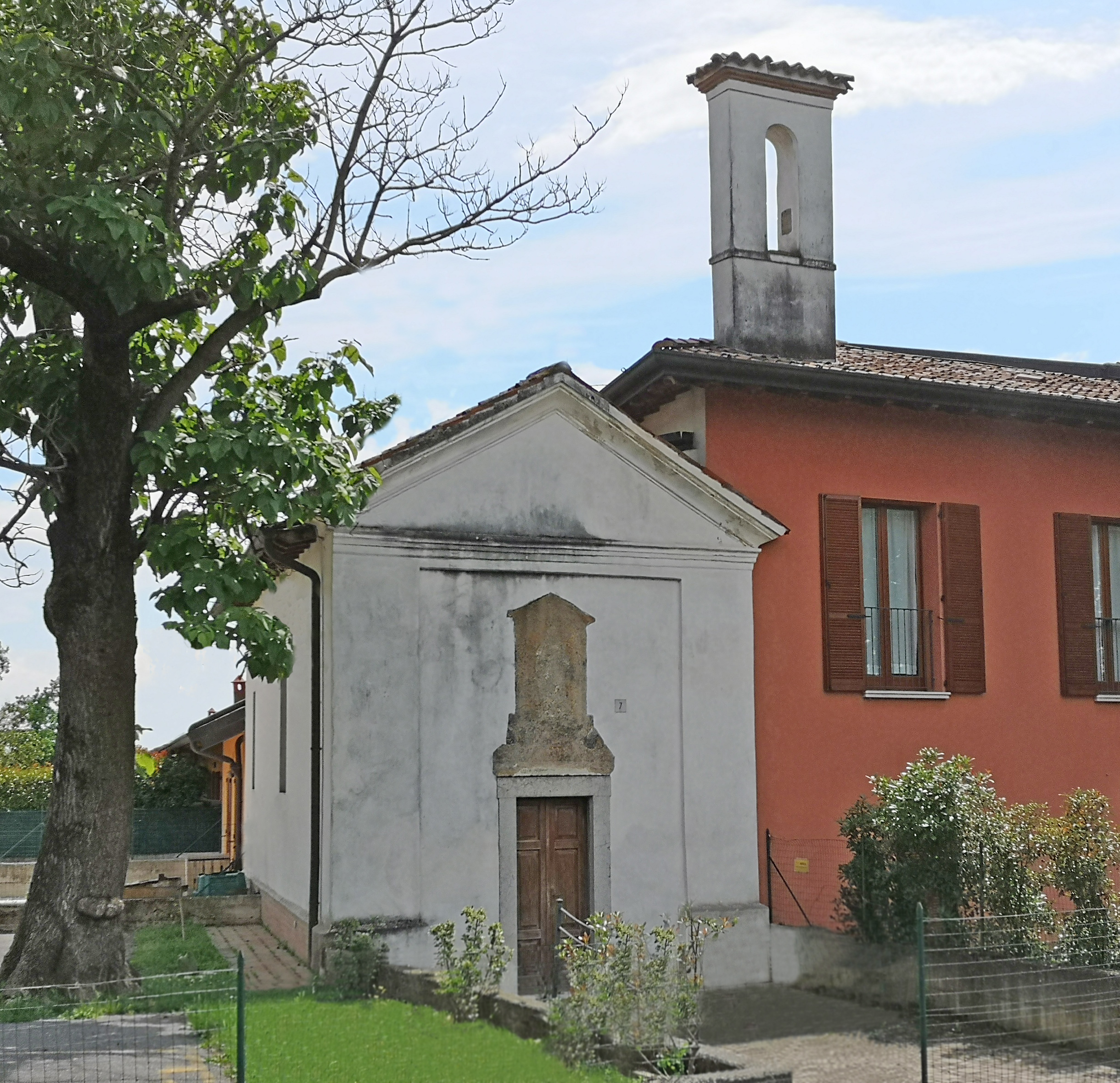 Chiesetta della cascina foresta, Travagliato